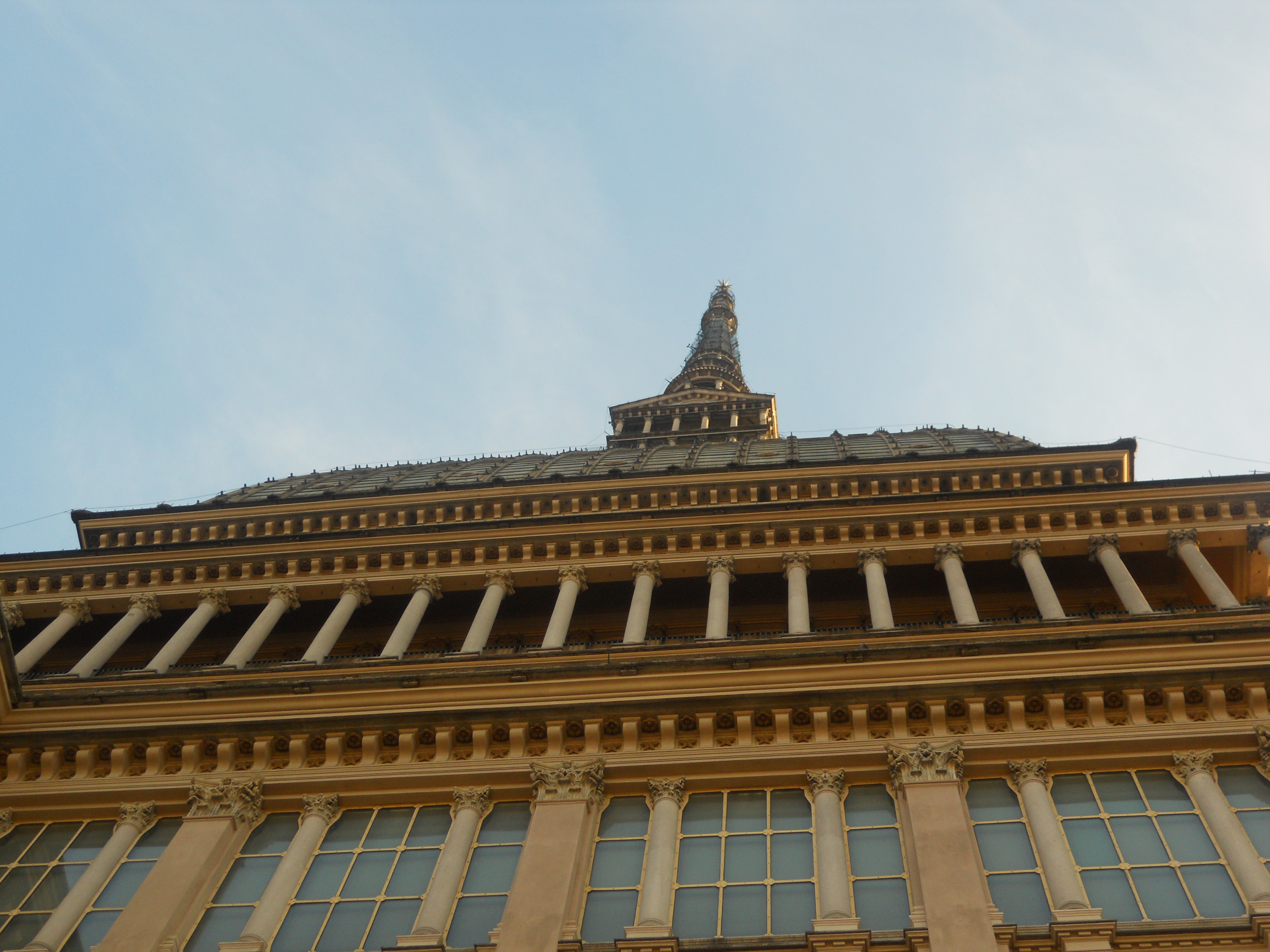 Mole Antonelliana vista dalla via sottostante